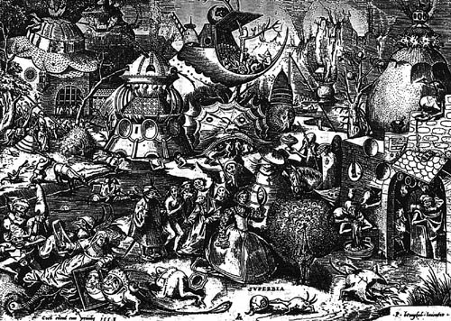 Todsünde Hochmut Holzstiche von Hieronymus Cock (1510 - 1570) nach Pieter Brueghel gemeinfrei Siehe auch: Datei:Brueghel - Sieben Laster - Superbia.jpg